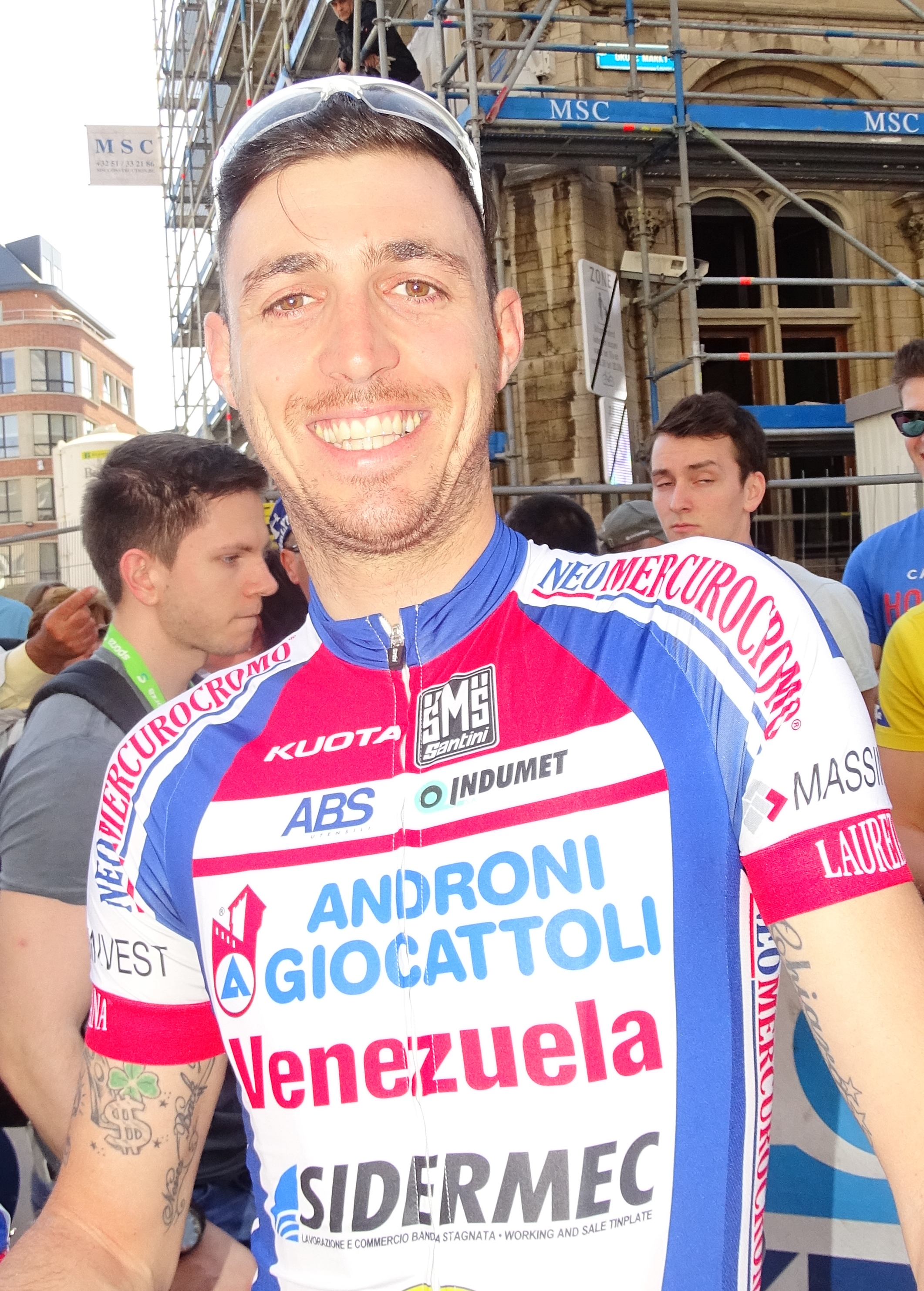 Reportage réalisé le mercredi 15 avril à l'occasion du départ de la Flèche brabançonne 2015 à Louvain, Belgique.